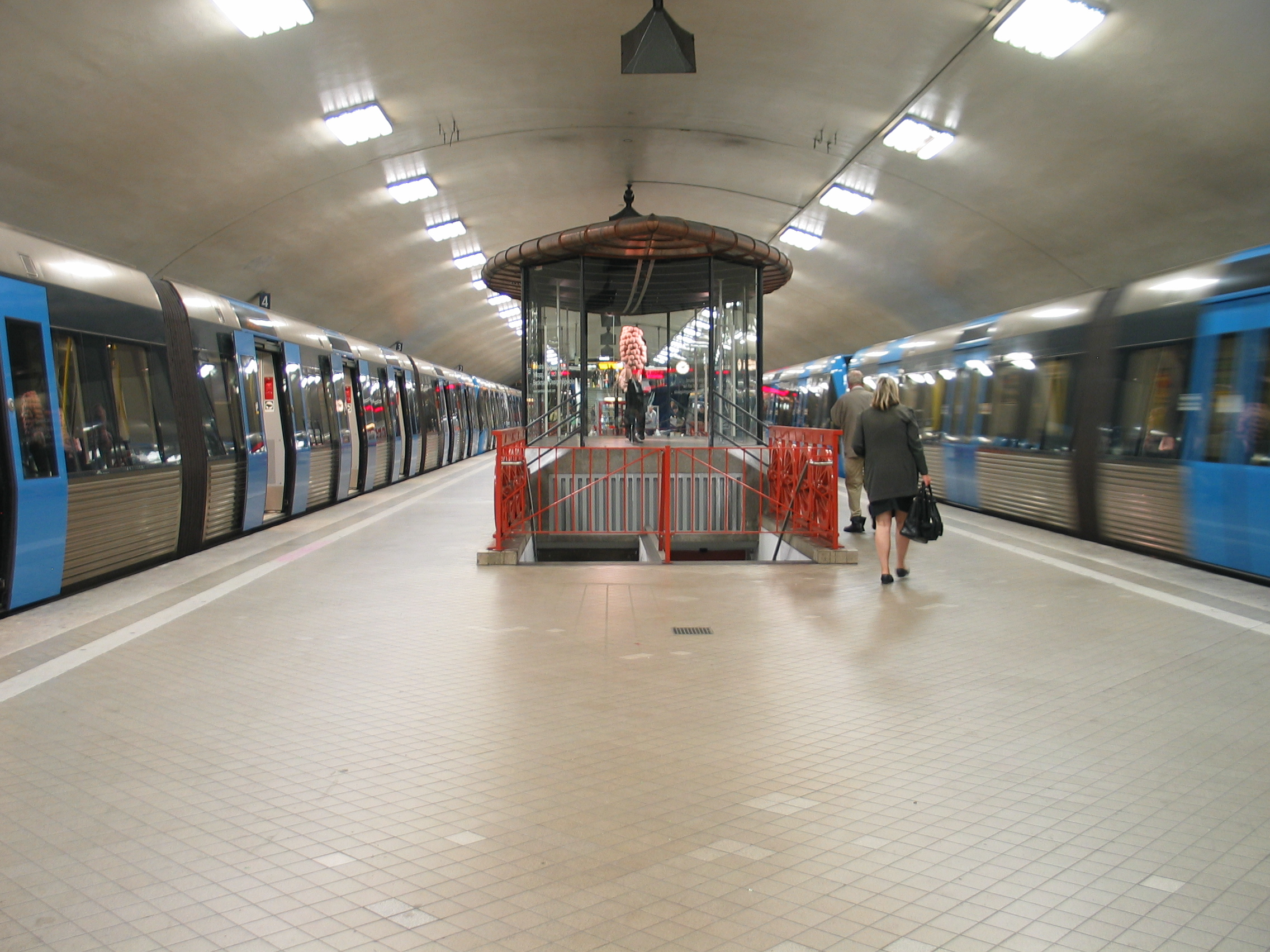 Odenplan, a metro station in Stockholm, Sweden.